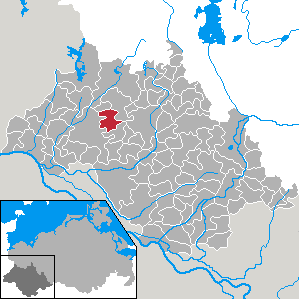 Körchow in Mecklenburg-Vorpommern - district Ludwigslust